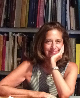 Anna Lo Bianco nel suo studio, 2016